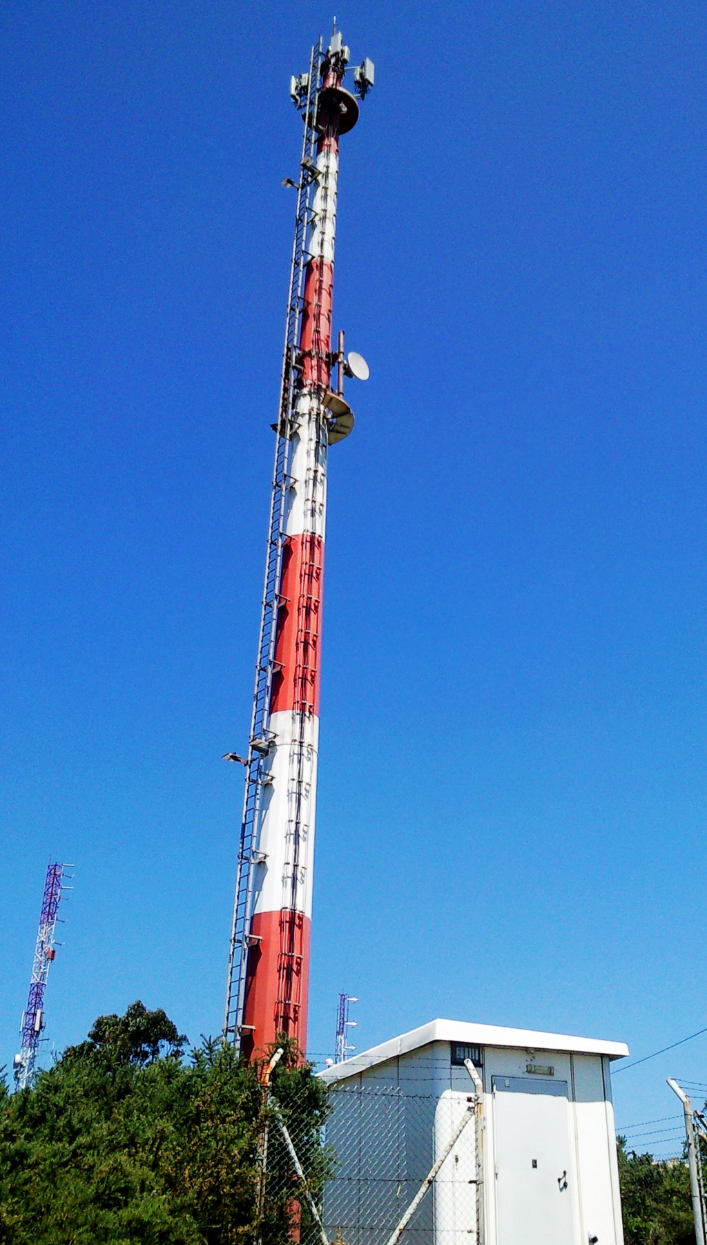 Antena telefonía móbil Cable R en Penamoa A Coruña